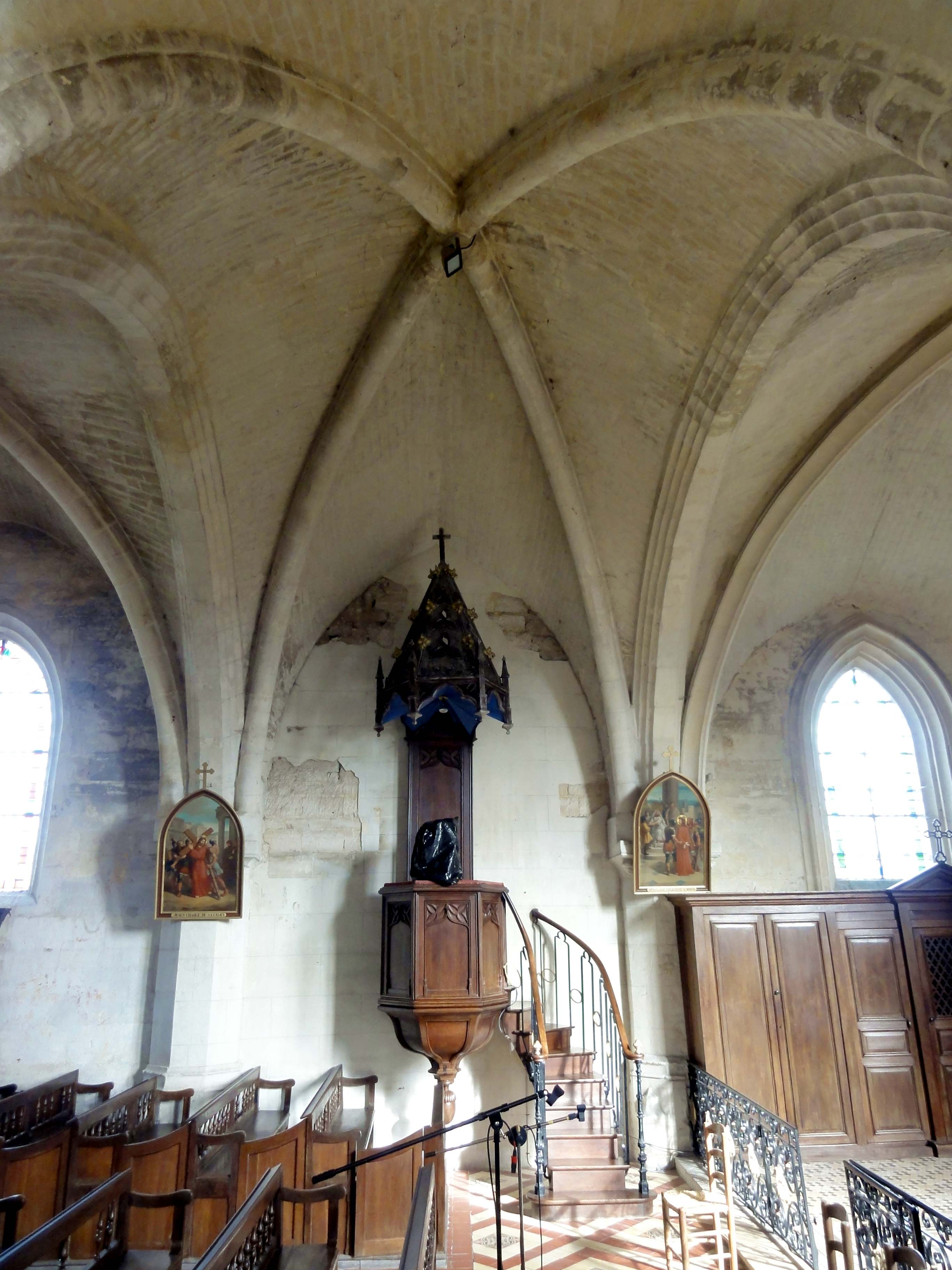 Voir titre.